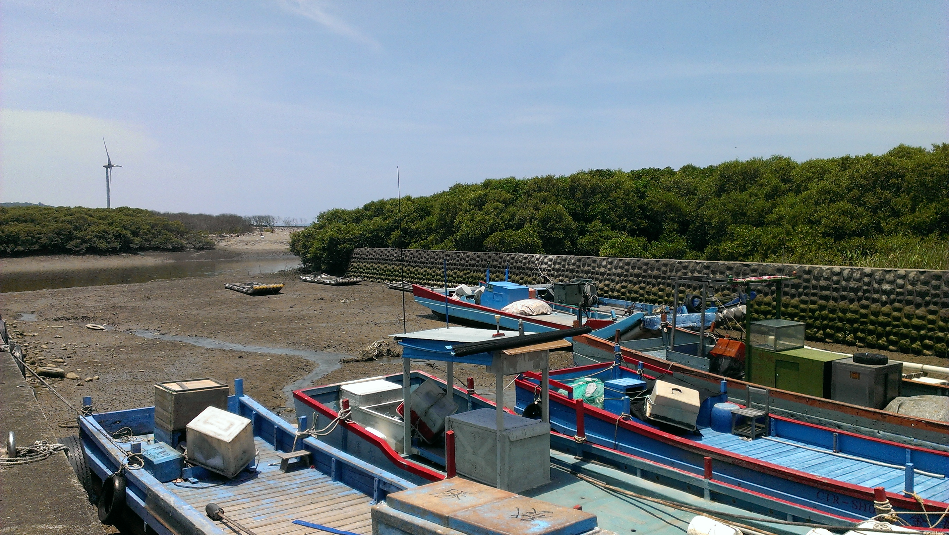 中文（台灣）: 紅毛港漁船一景